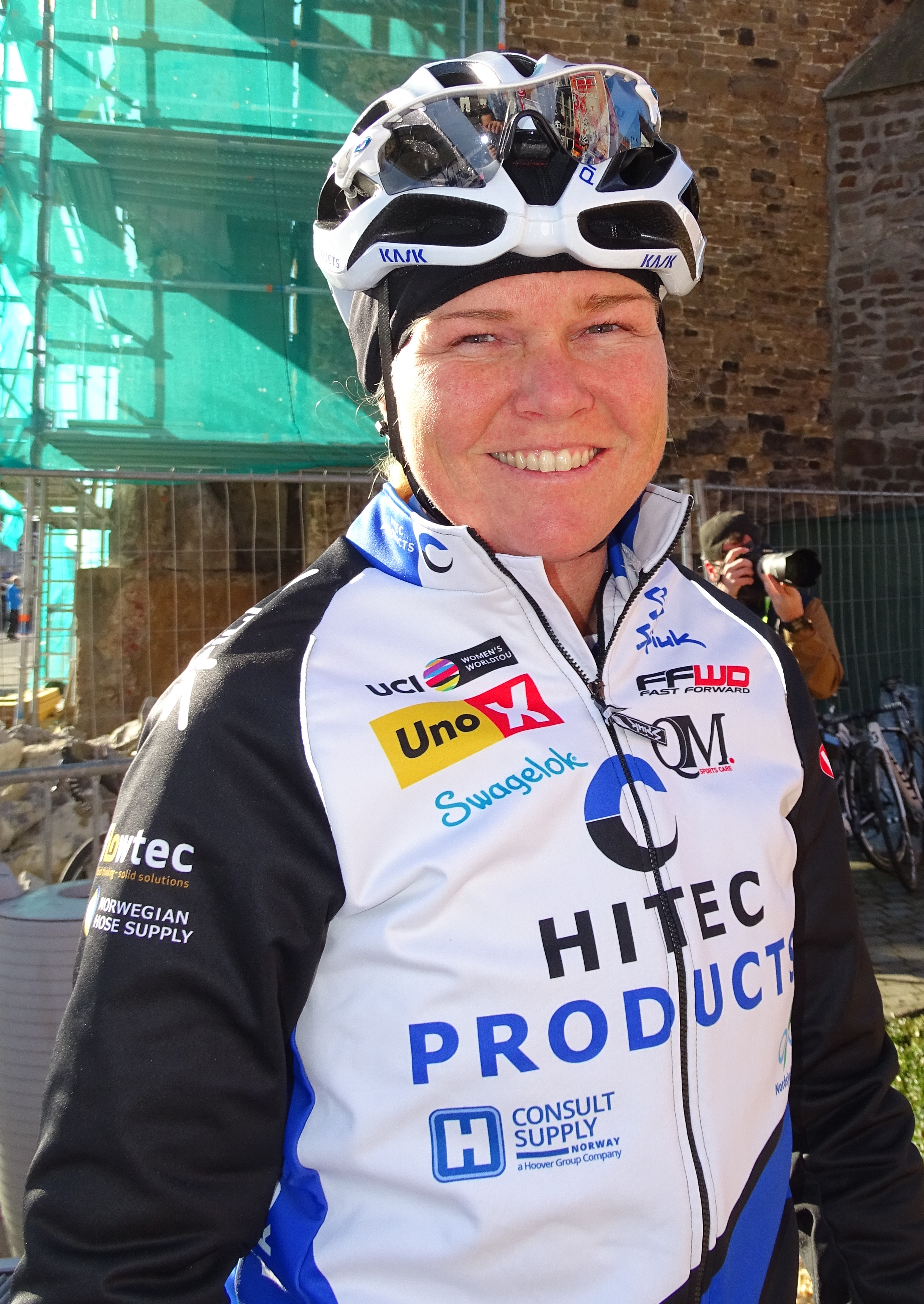 Reportage réalisé le mercredi 2 mars à l'occasion du départ du Samyn des Dames 2016 et du Samyn 2016 à Quaregnon, Belgique.